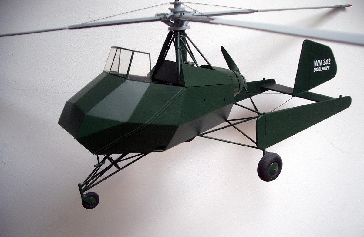 Doblhoff WNF 342 Modell im Maßstab 1 zu 4,6 im Hubschraubermuseum